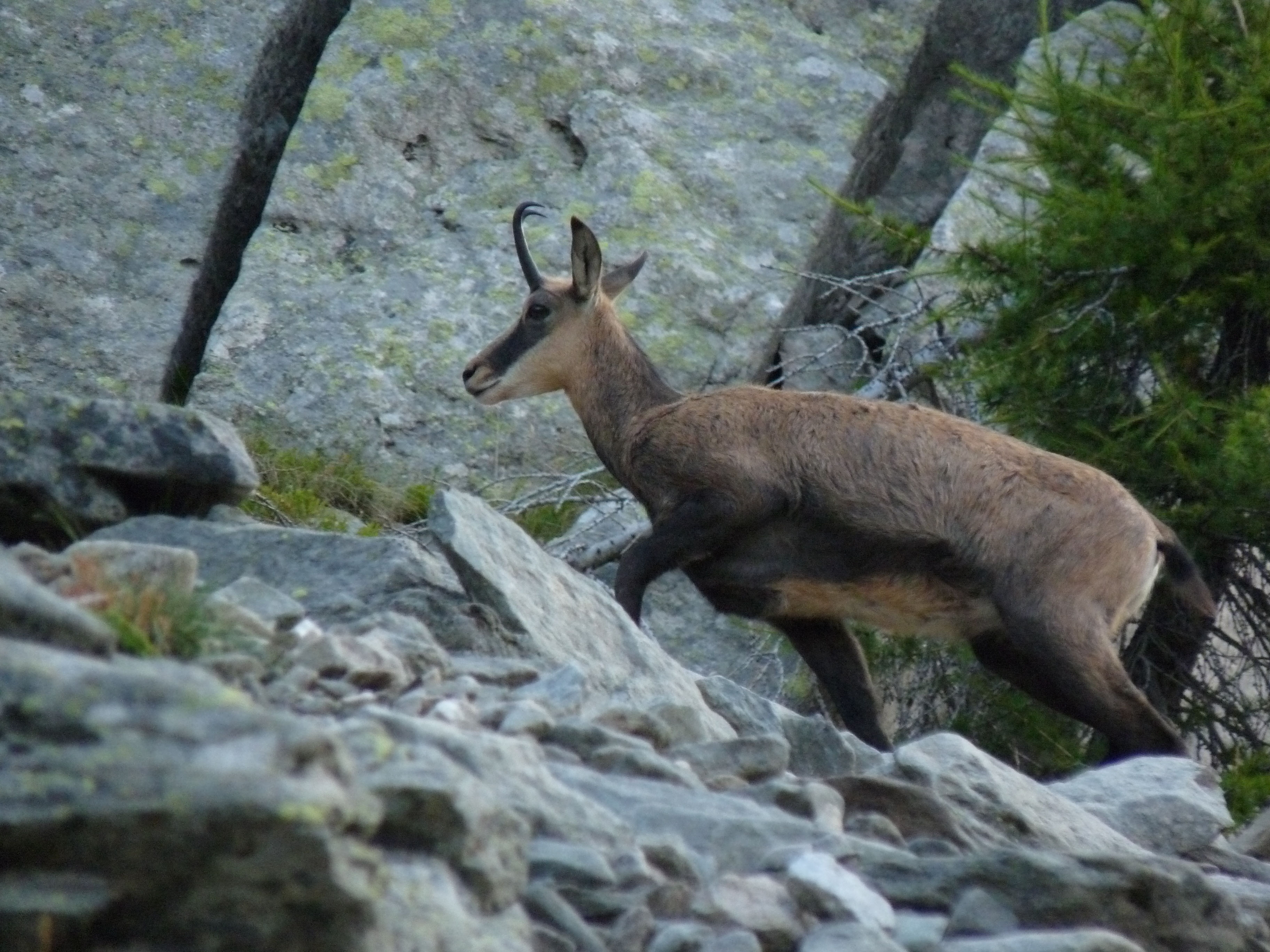 Chamois (Rupicapra rupicapra) dans les Alpes du Sud